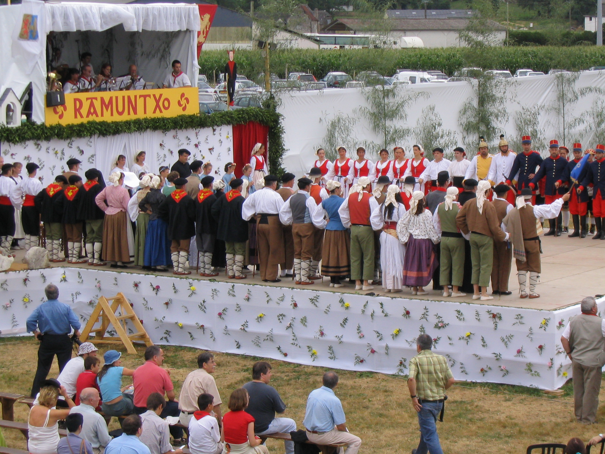 Ramuntxo pastorala, 2003ko uztaila. Idauze-Mendi, Zuberoa. Euskal Herria. Ramuntxo pastoral, July of 2003. Idaux-Mendy, Soule. Basque Country.